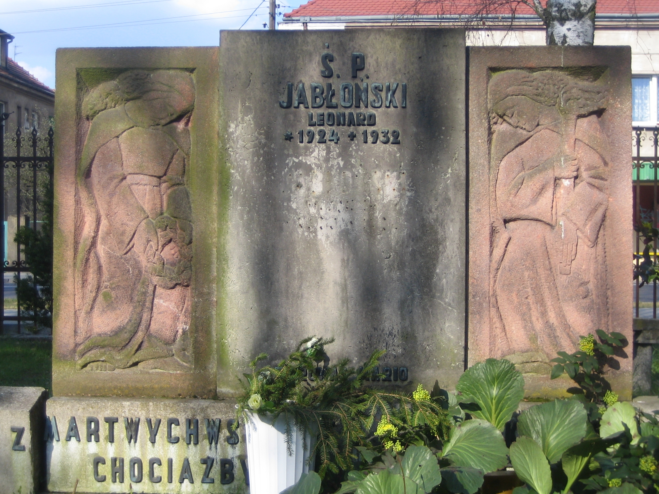 Nagrobek Jabłońskich na cmentarzu na Jeżycach